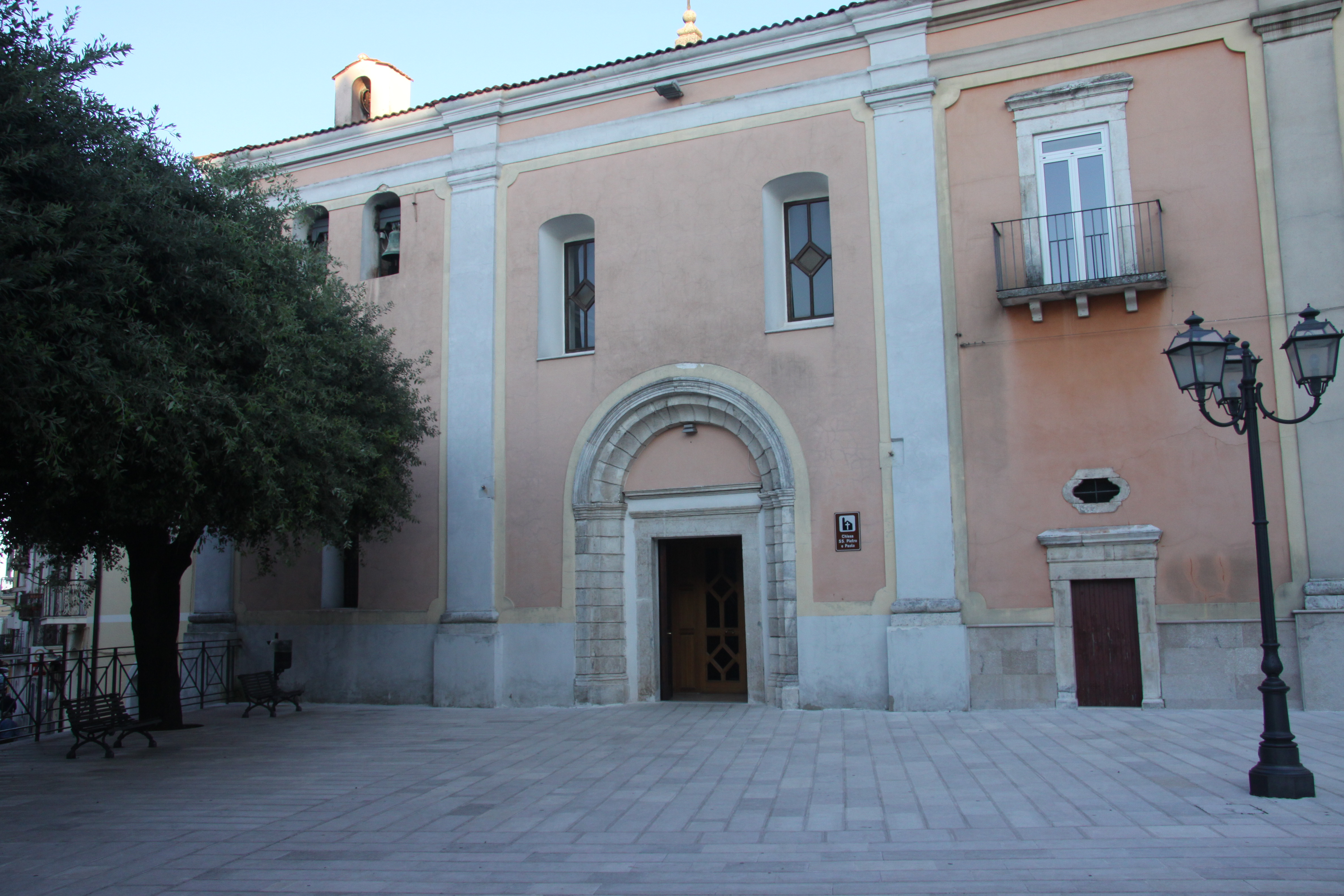 Chiesa San Pietro e Paolo This is a photo of a monument which is part of cultural heritage of Italy.